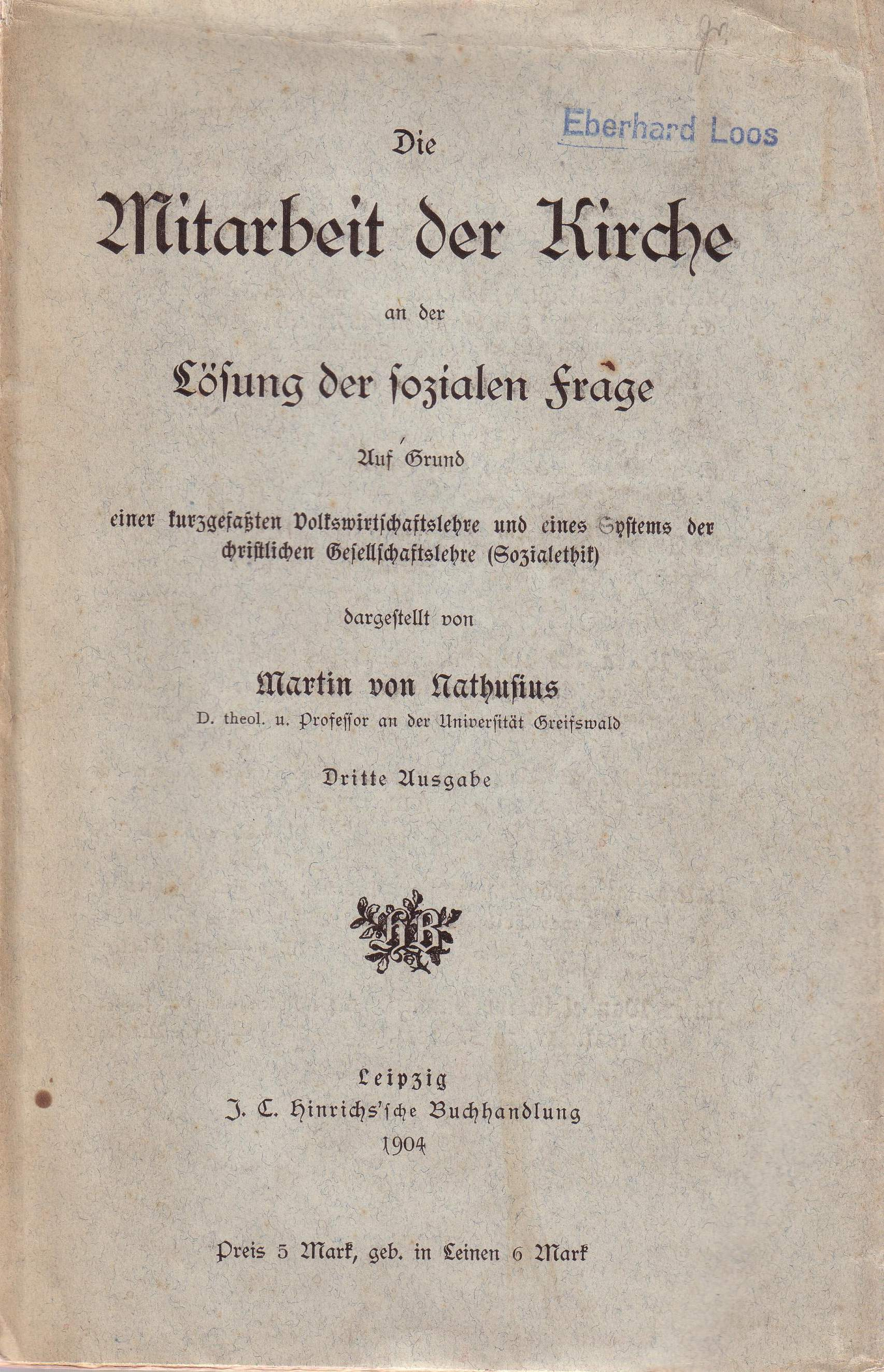 book cover old, Die Mitarbeit der Kirche ...